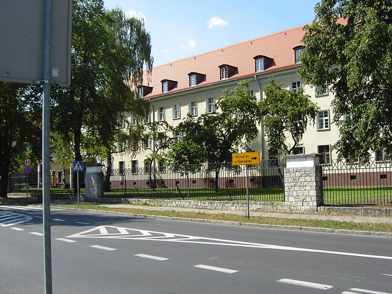 Koszary przy ulicy Łukasińskiego w Szczecinie. W tym budynku funkcjonował sztab 41 pp (od 1945), 41 pz (do 1995), sztab 29 BZ (do 1998) i poczatkowo sztab korpusu Płn Wsch